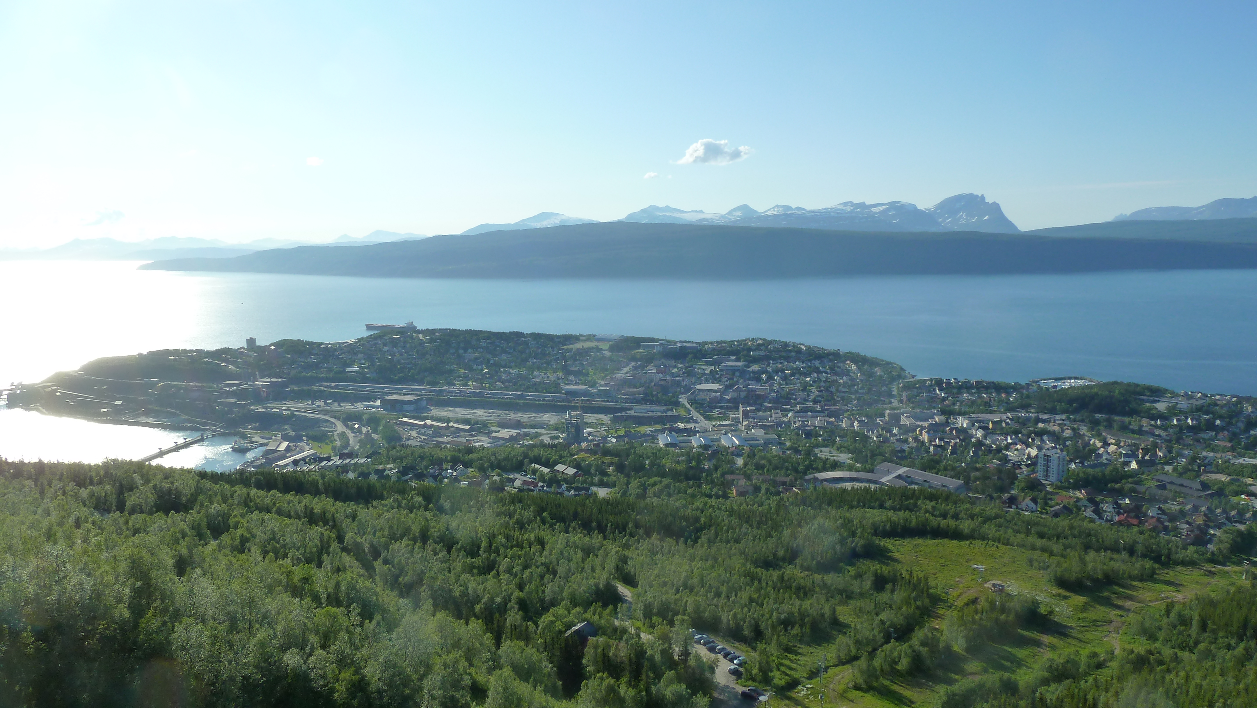 Narvik von Fagernesfellet aus